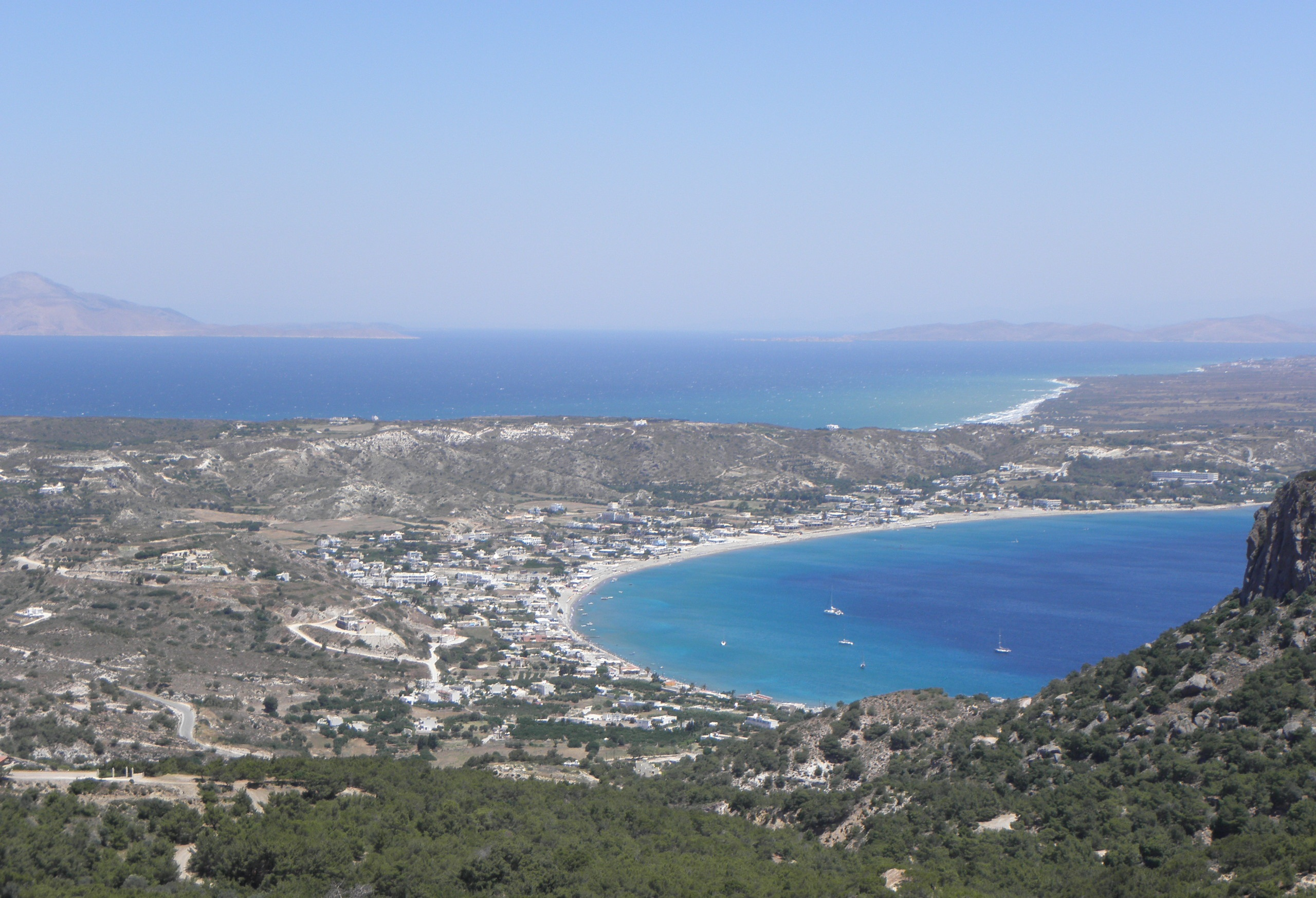 Kóský isthmos mezi vlastním ostrovem a poloostrovem Kéfalos; Kós (GR)